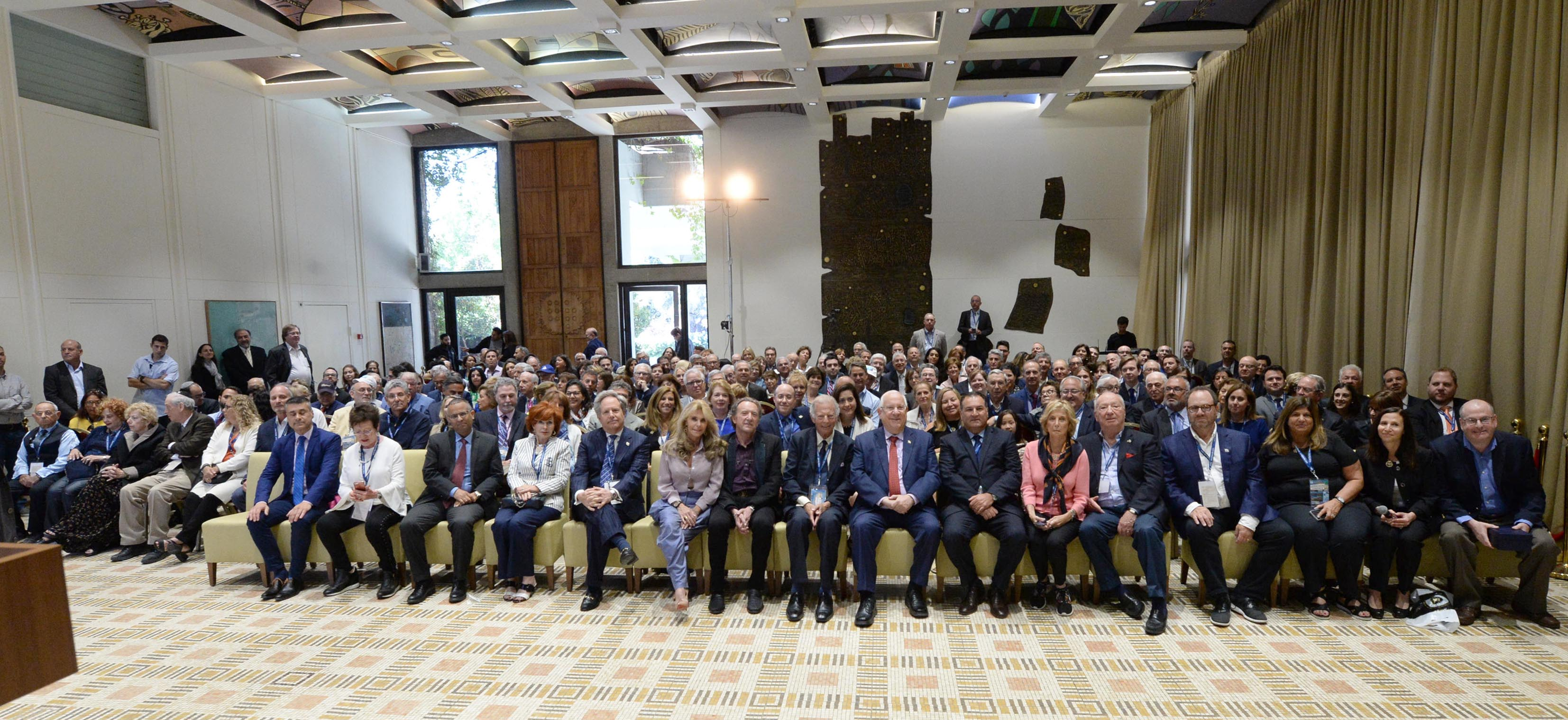 ראובן ריבלין נשיא מדינת ישראל בפגישה עם משלחת הבונדס אשר מבקרת בישראל.